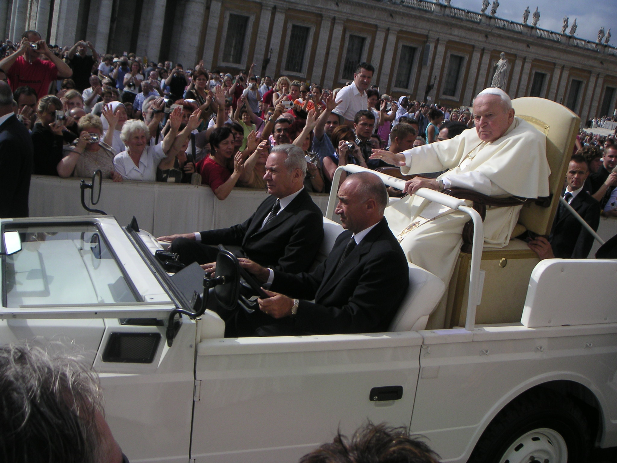 Der kränkliche Papst Johannes Paul II. am 22.09.2004